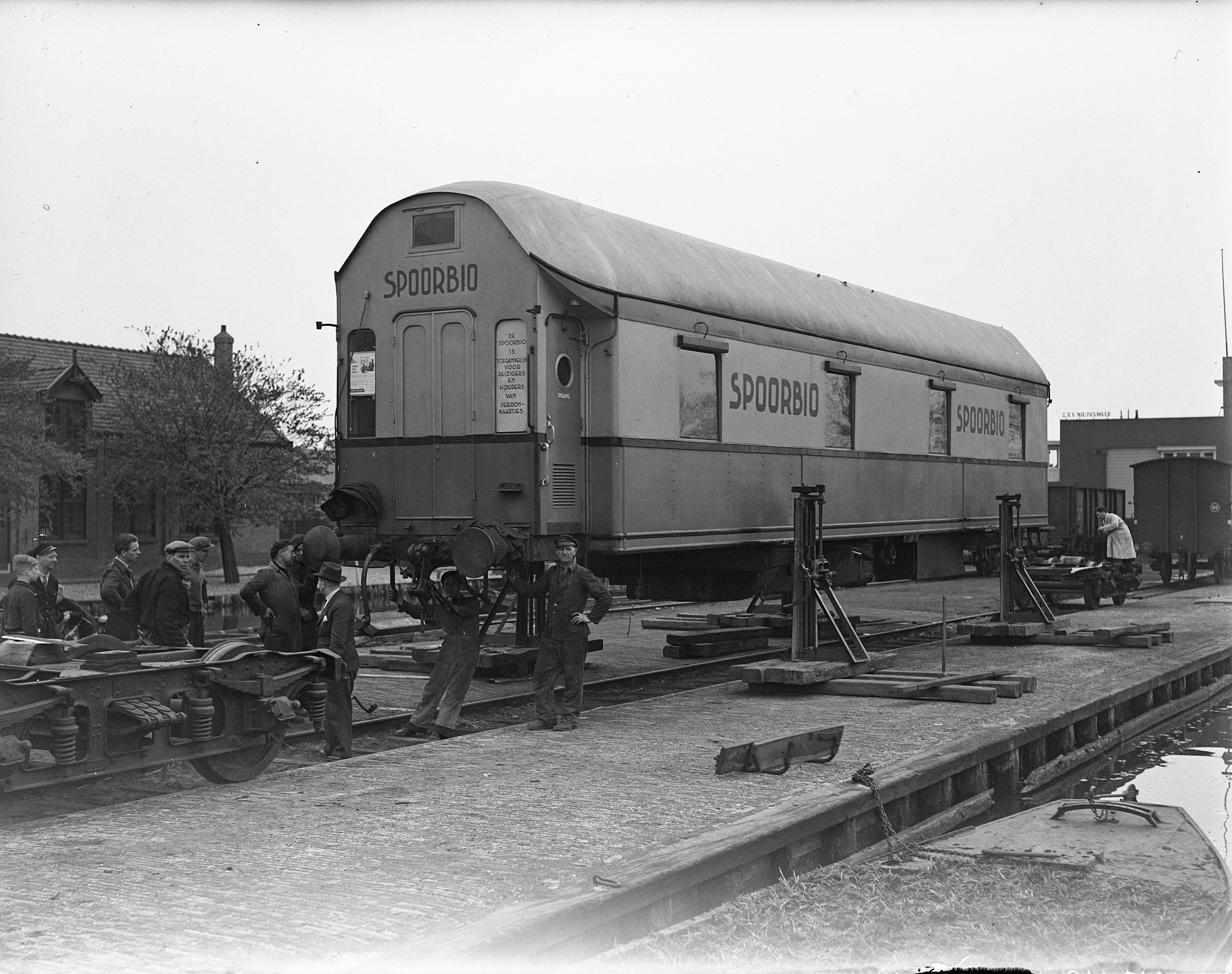 Collectie / Archief : Fotocollectie Anefo Reportage / Serie : [ onbekend ] Beschrijving : Spoorbiowagen op de bokken Datum : 29 april 1948 Trefwoorden : BOKKEN Fotograaf : Oorschot, […] van / Anefo Auteursrechthebbende : Nationaal Archief Materiaalsoort : Glasnegatief Nummer archiefinventaris : bekijk toegang 2.24.01.09 Bestanddeelnummer : 902-7160